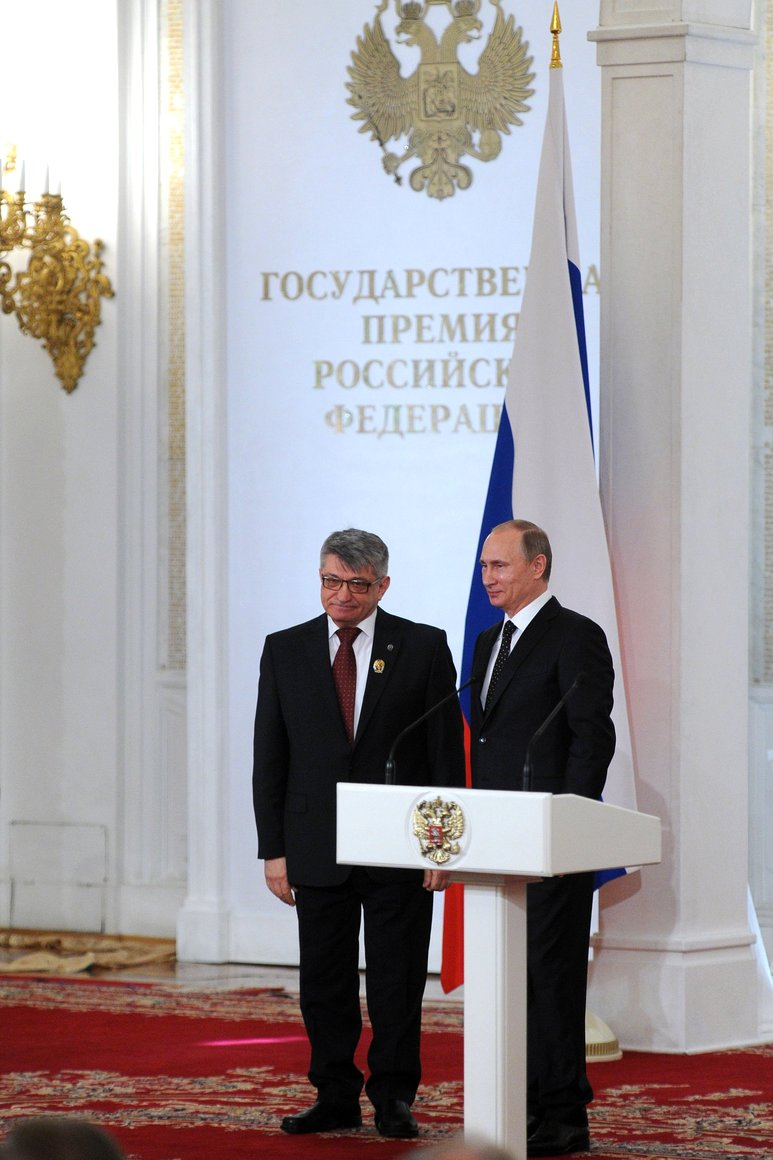 Вручение Государственных премий Российской Федерации. С лауреатом Государственной премии Российской Федерации в области литературы и искусства 2014 года Александром Сокуровым.